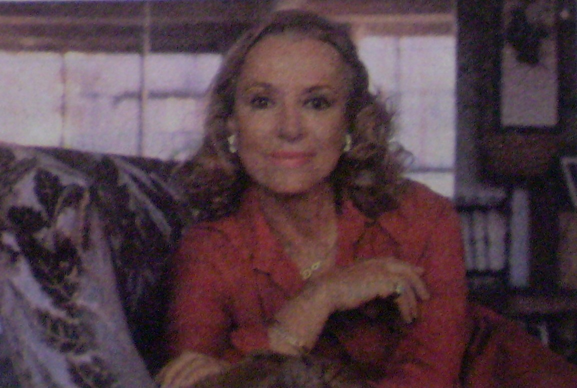 Olga Zubarry